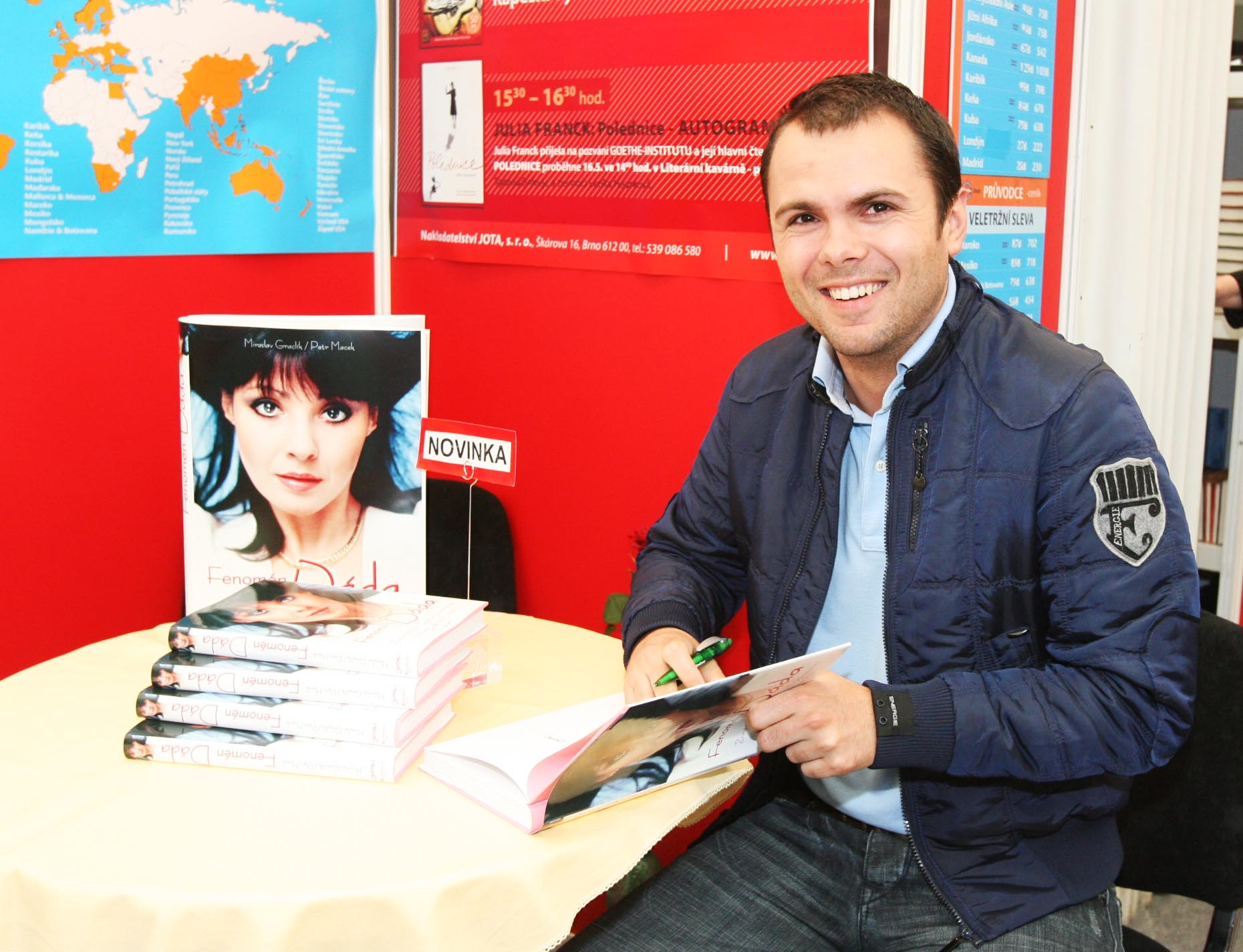 spisovatel Petr Macek na autogramiádě knihy Fenomén Dáda, Svět knihy Praha, 2009